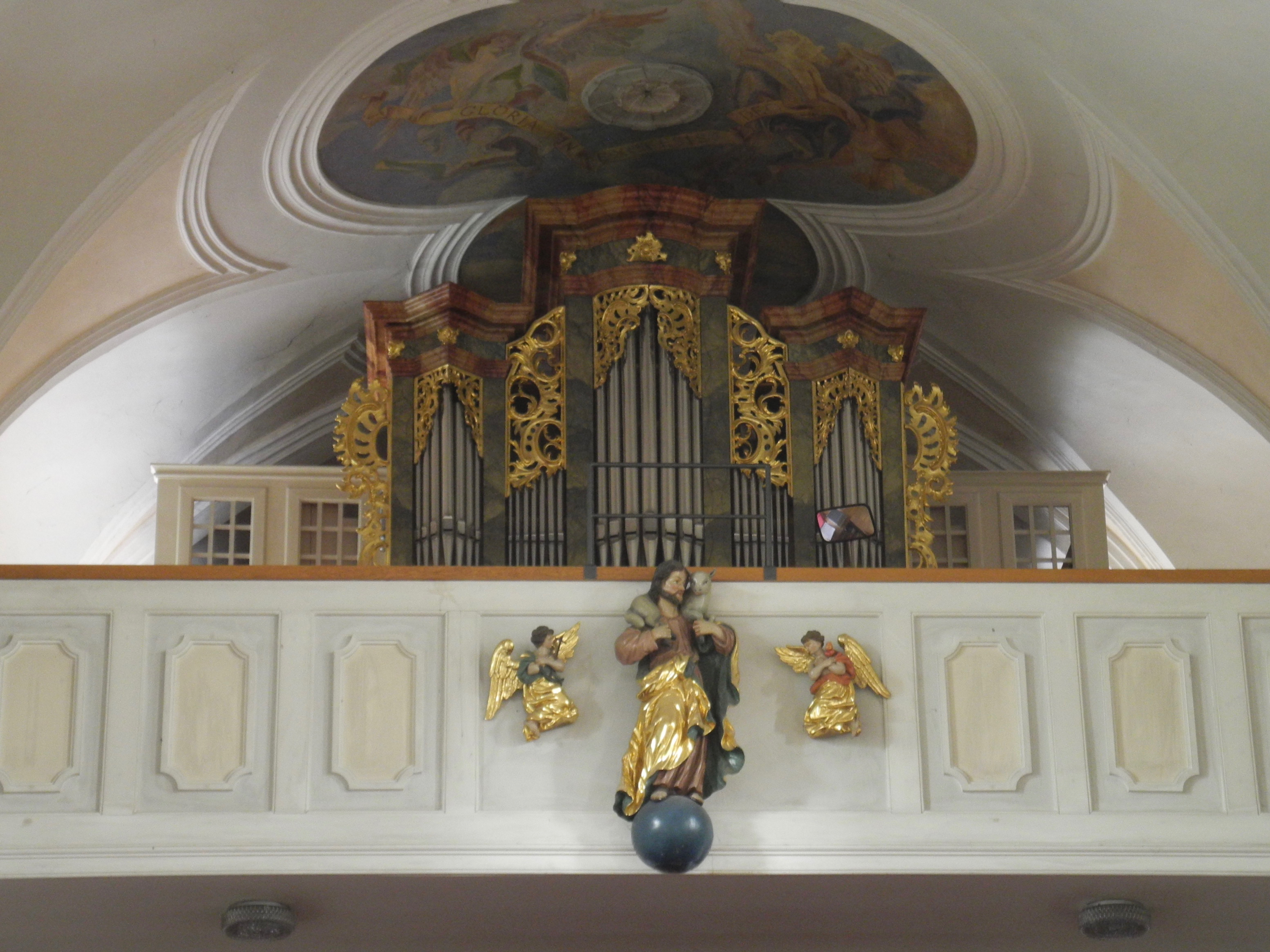 Gehäuse Brandenstein 1724, Neubau 2000 Michael Mattes Metten